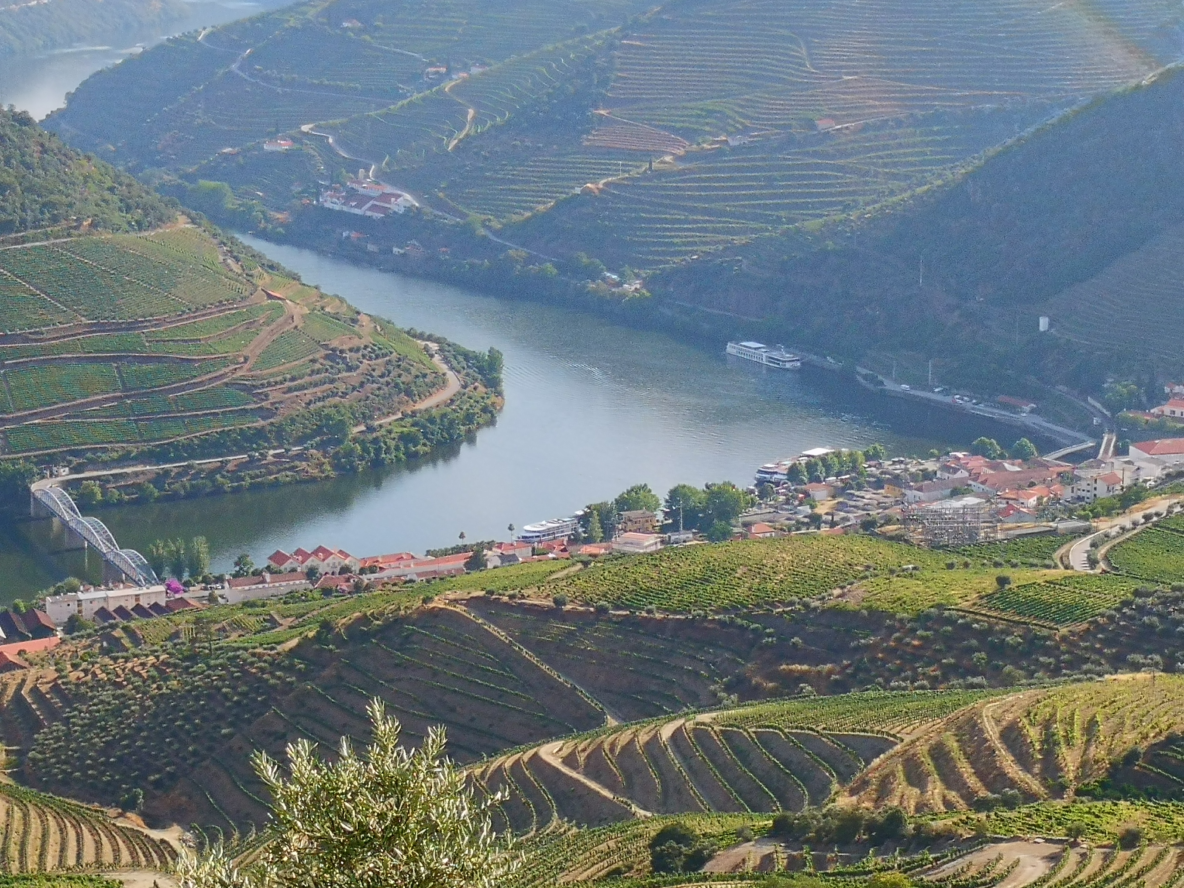 O Douro visto do Miradouro de Casal de Loivos